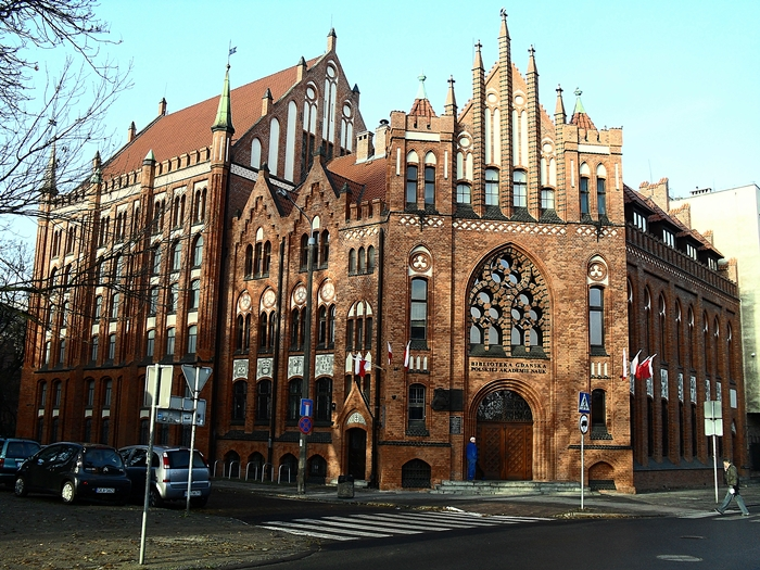 Biblioteka Gdańska - ob. PAN ul. Wałowa 15, Gdańsk